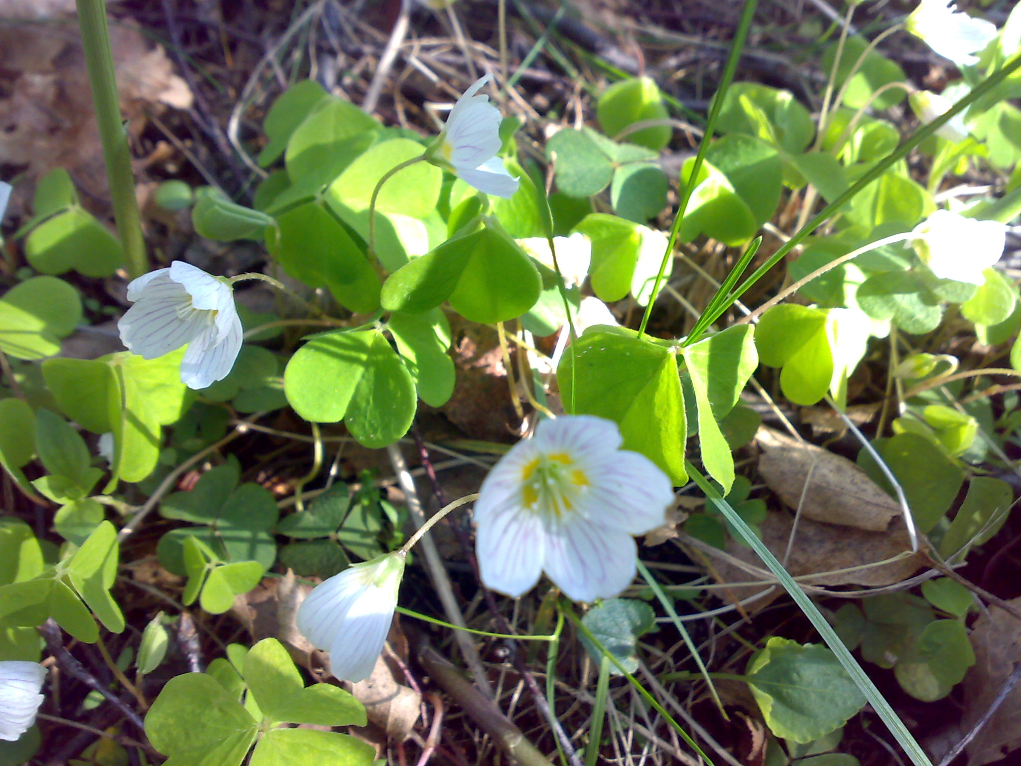 Gjøkesyre Gaukesyre Oxalis acetosella Norway